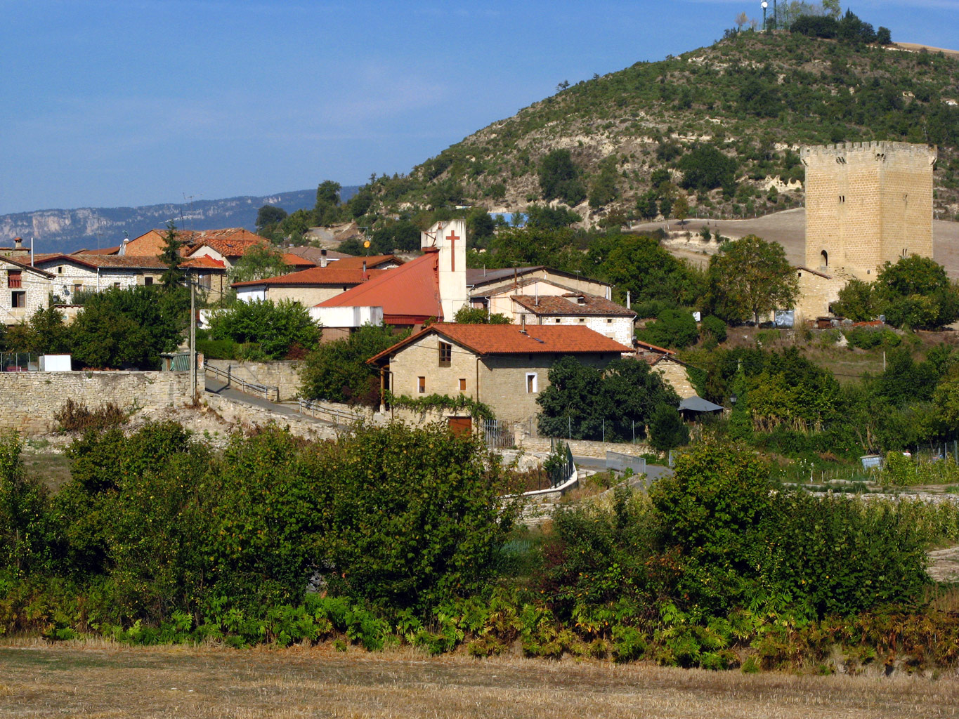 Torre de Orgaz, Fontecha, Lantarón, Alava, País Vasco.